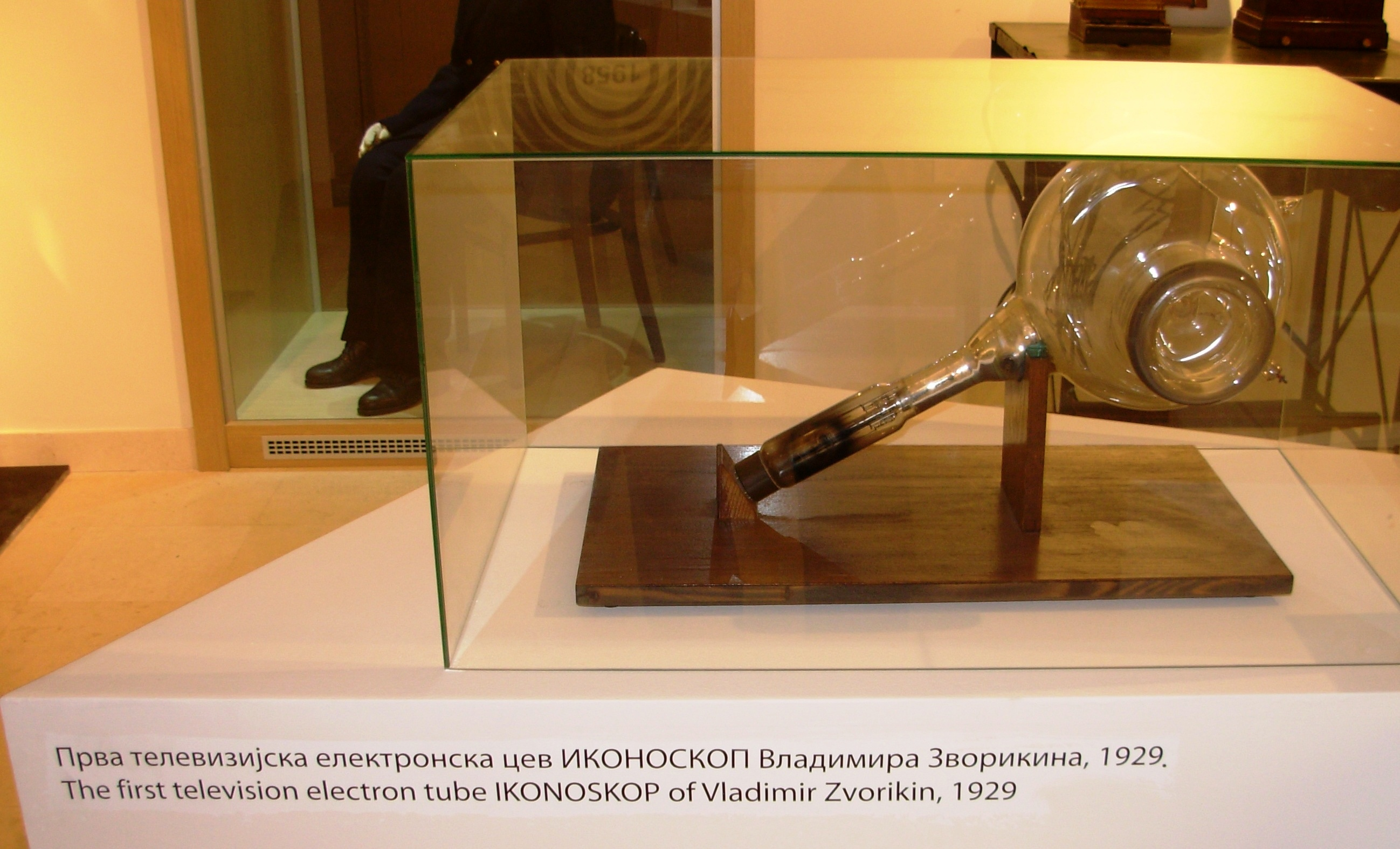 Ikonoskop - stalna postavka u Muzeju PTT-a, ulica Majke Jevrosime, Beograd. Slikao Goldfiger